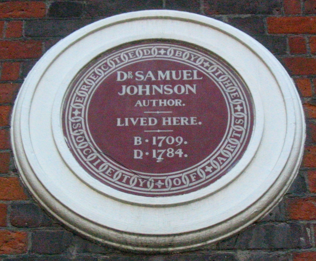 Nrf: Pliaque à Londres